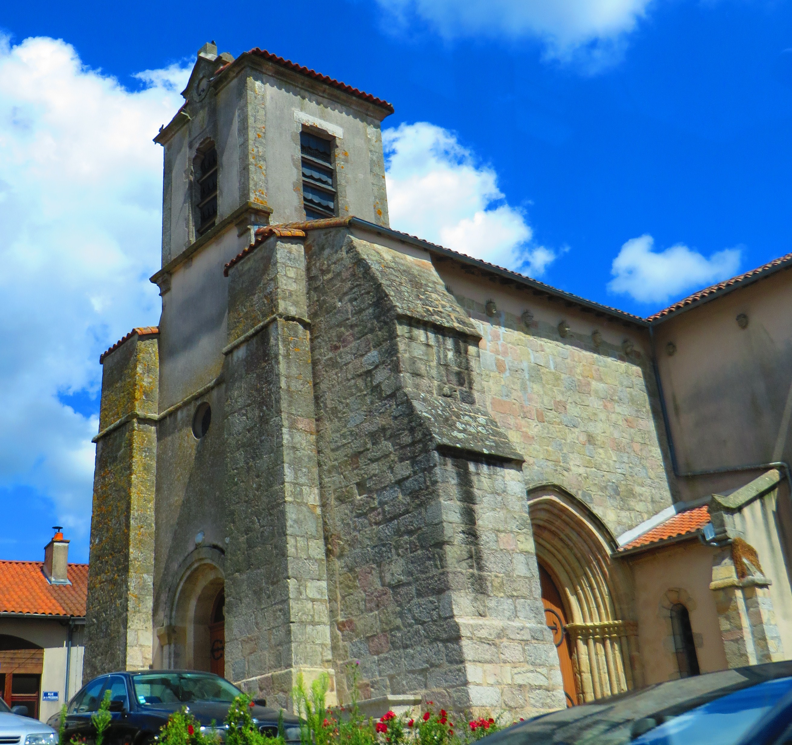 Berneuil eglise